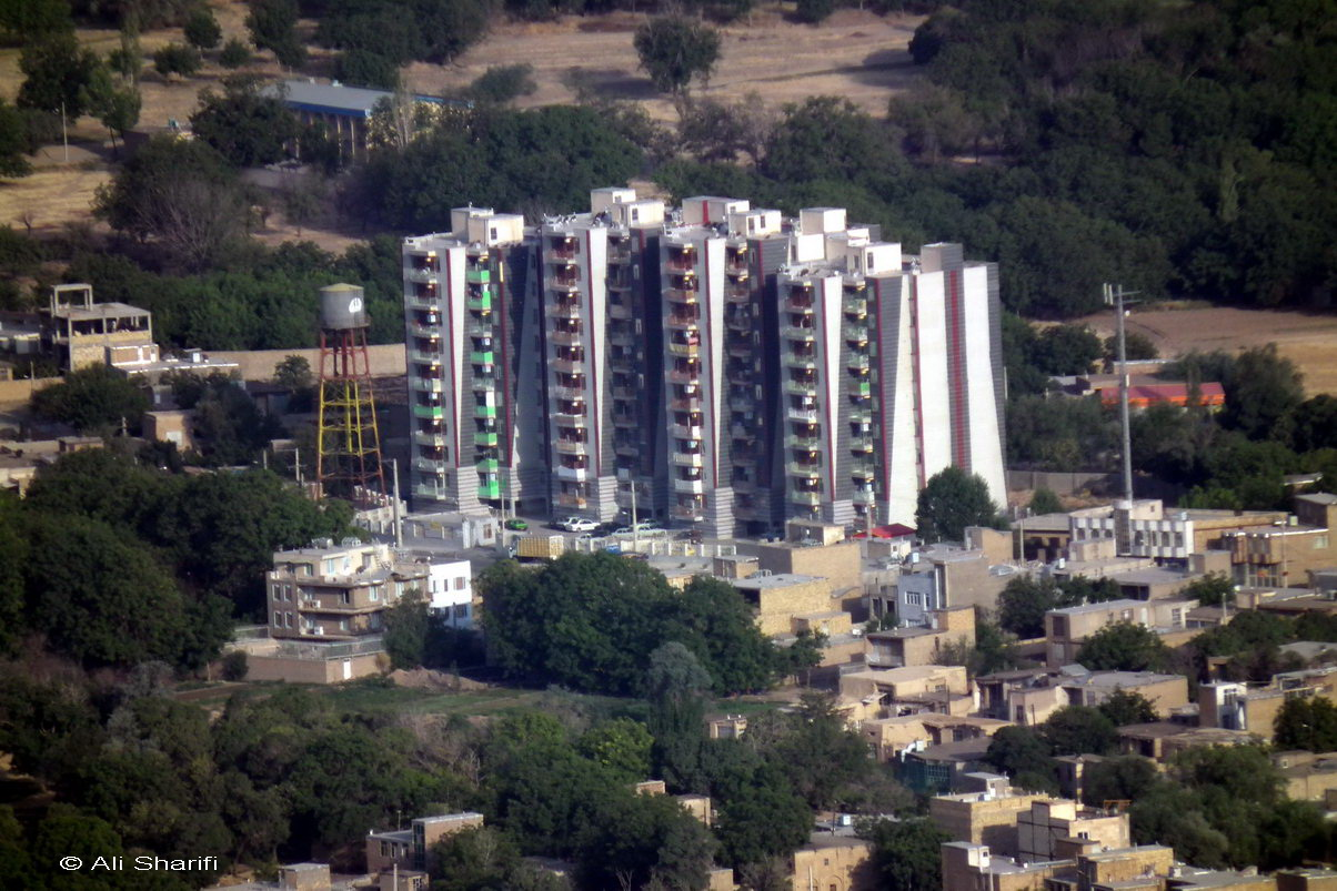 مجتمع مسکونی واقع در کرهرود - اراک - نقطه ثبت تصویر 34.059190, 49.638998